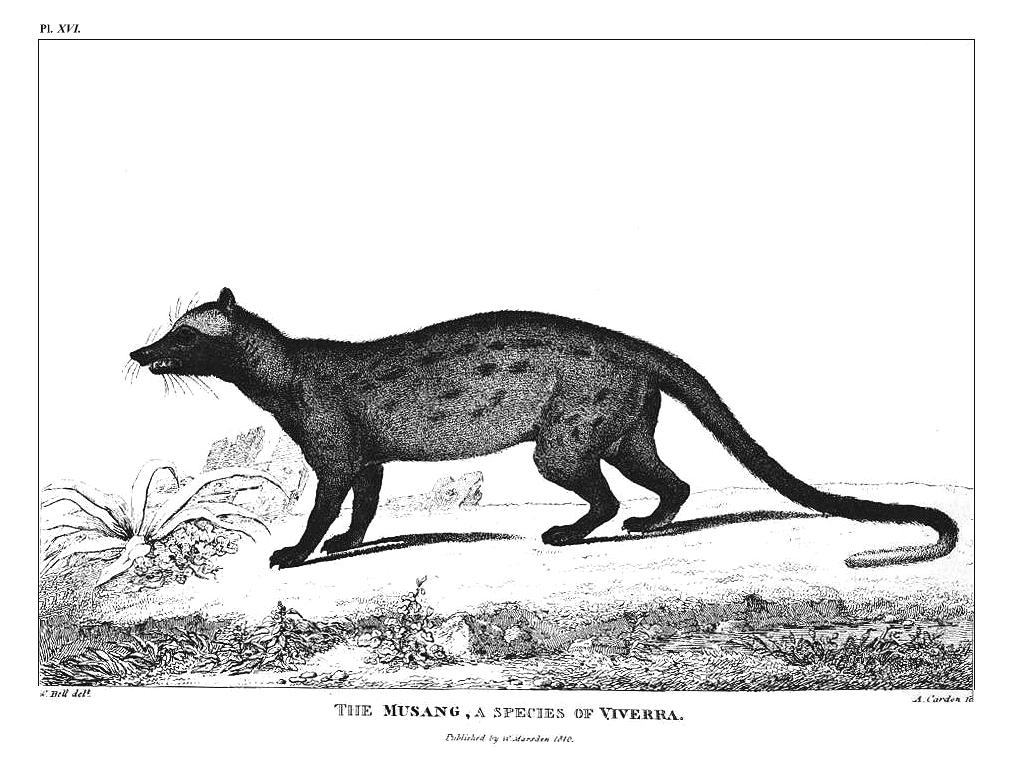 William Marsden: The History of Sumatra. Tafel XVI: Musang